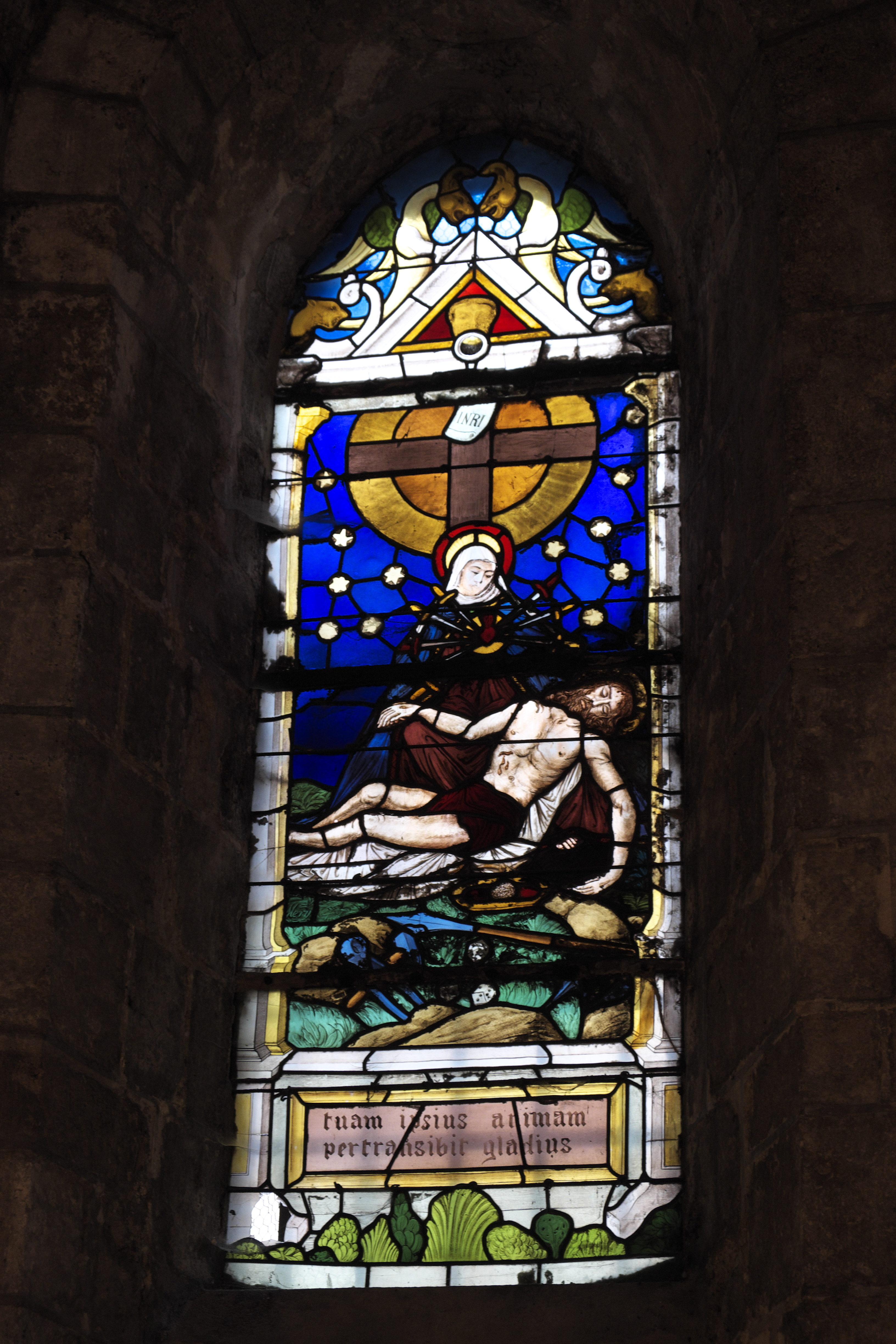 Katholische Pfarrkirche Notre-Dame-de-l’Assomption in La Ferté-Alais im Département Essonne (Île-de-France/Frankreich), Bleiglasfenster aus dem Ende des 16./Anfang des 17. Jahrhunderts, Darstellung: Pietà, Maria von sieben Schwertern durchbohrt